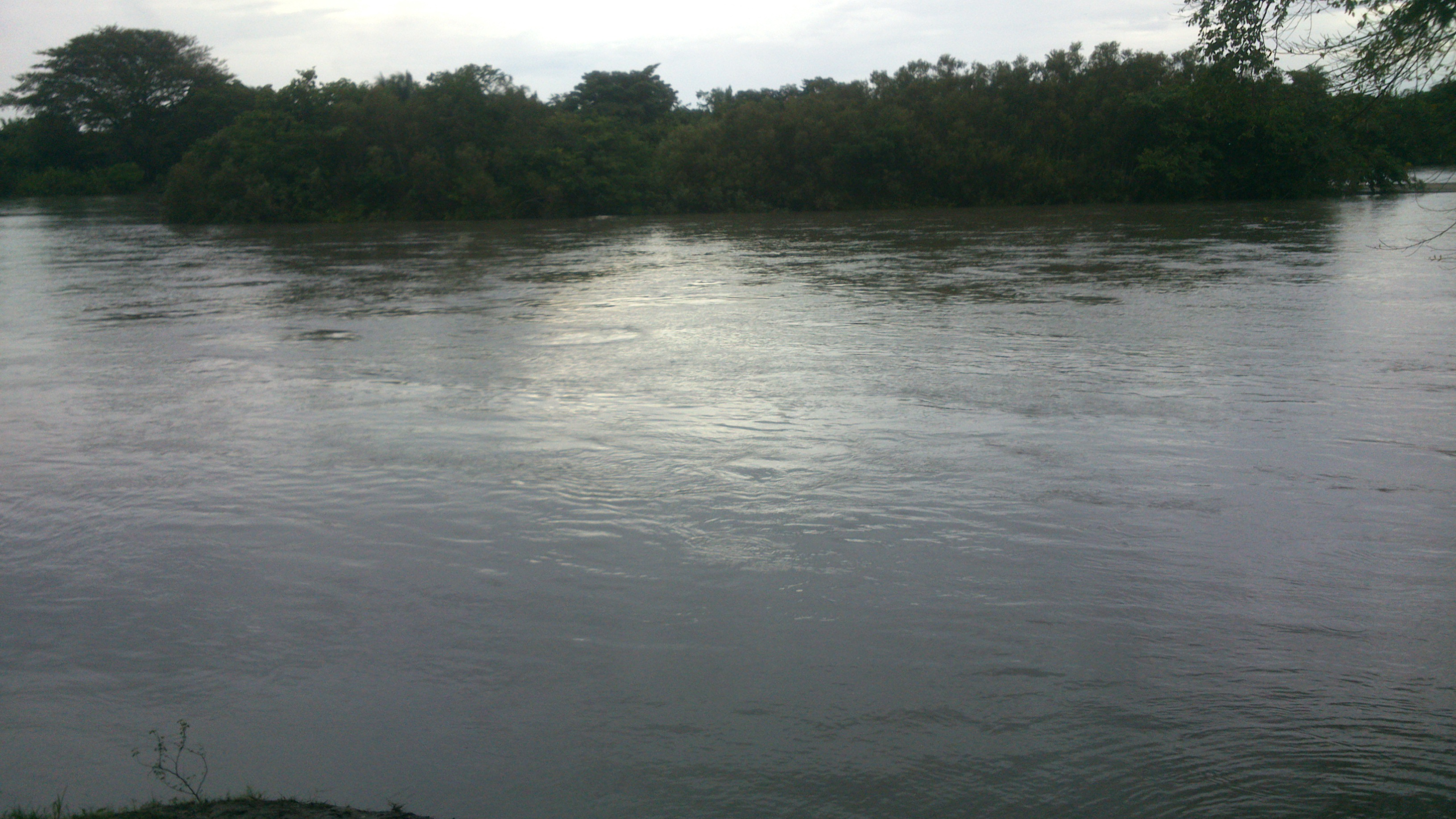 Ubicación: PUERTO RONDON, ARAUCA